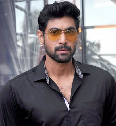 Rana Daggubati at 'Baahubali' media meet